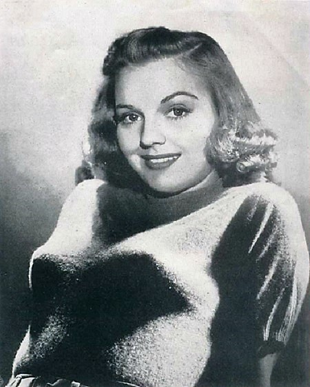 Lynn Merrick